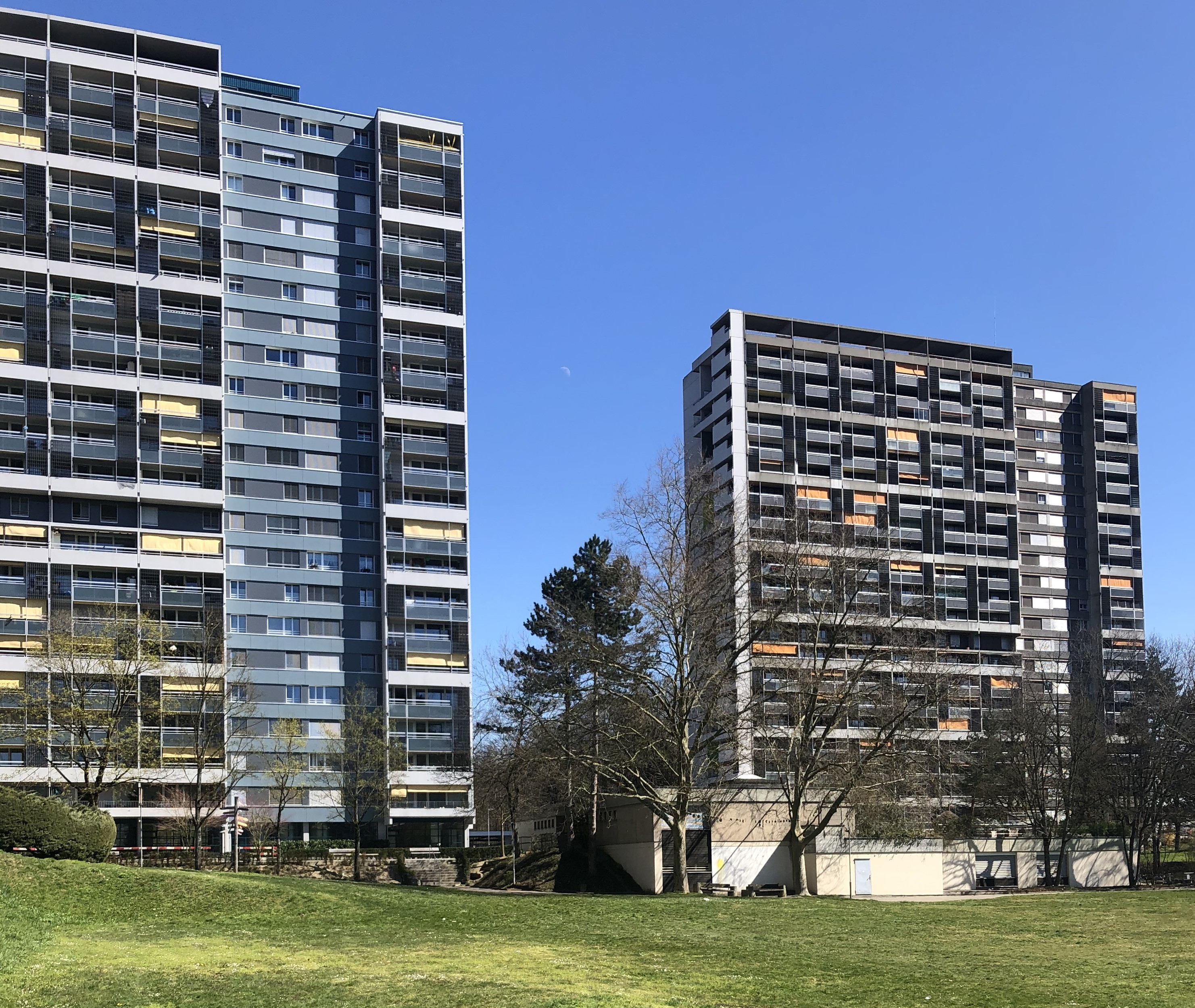 Bethlehemacker Hochhäuser